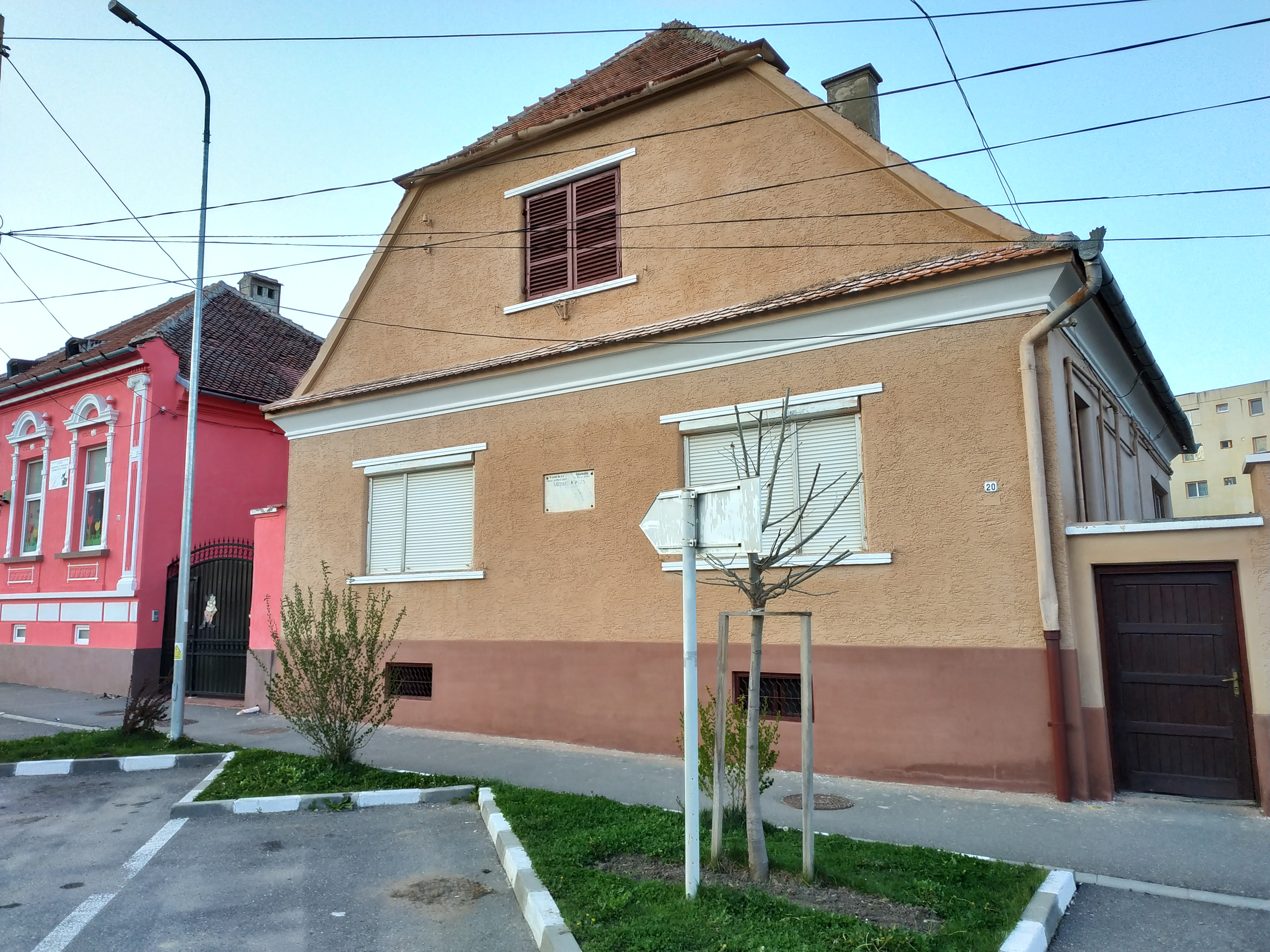 Casa scriitorului popular Michael Königes, Str. Măgurii Nr. 20, Codlea, județul Brașov, România